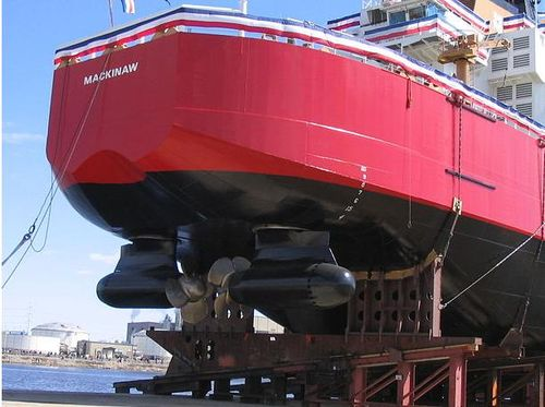 Fotografía de los AZIPOD de un buque antes de ser botado.